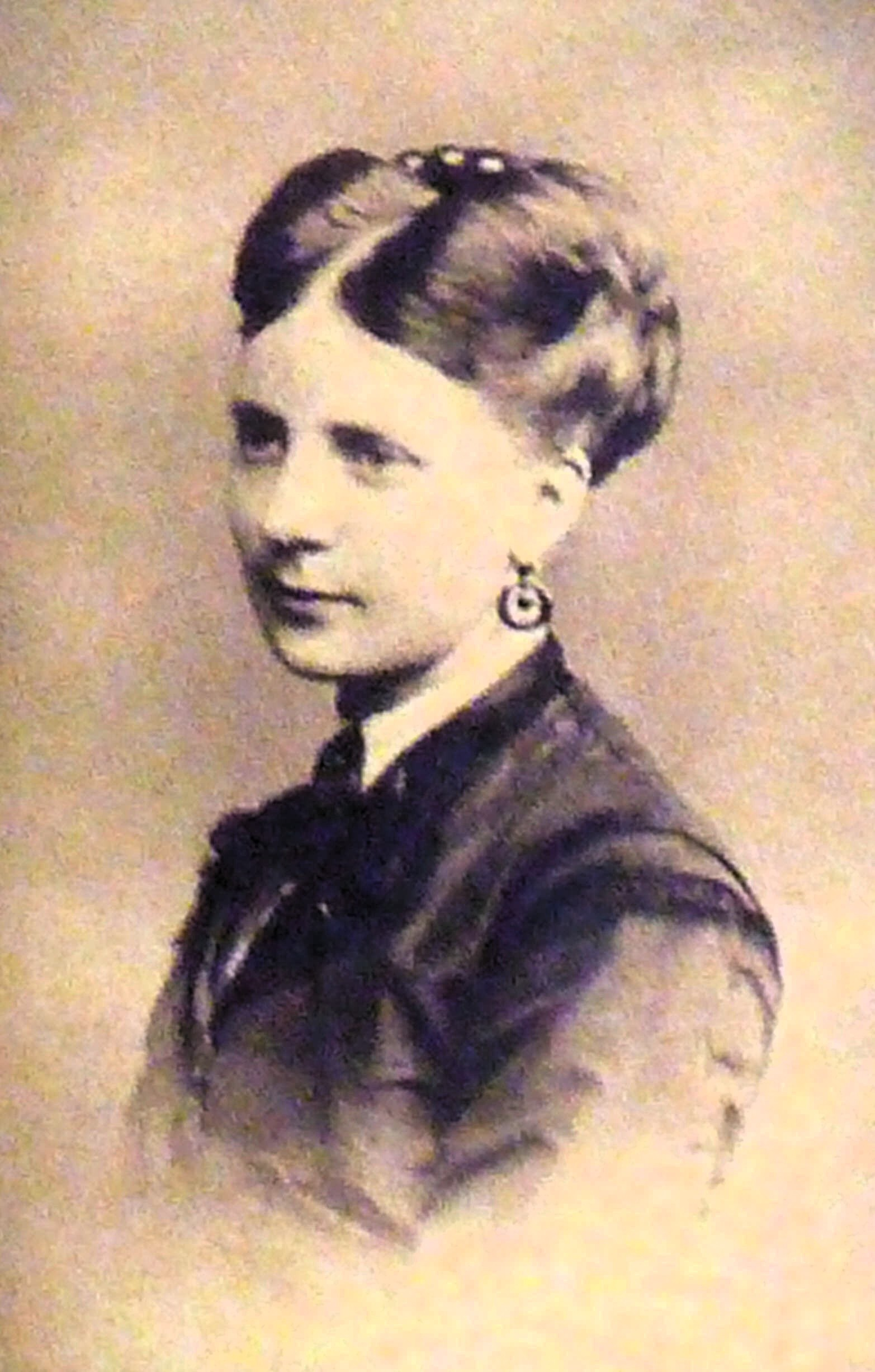 Elisabeth Mann, das Vorbild für Tony Buddenbrook, in ihrer Jugend